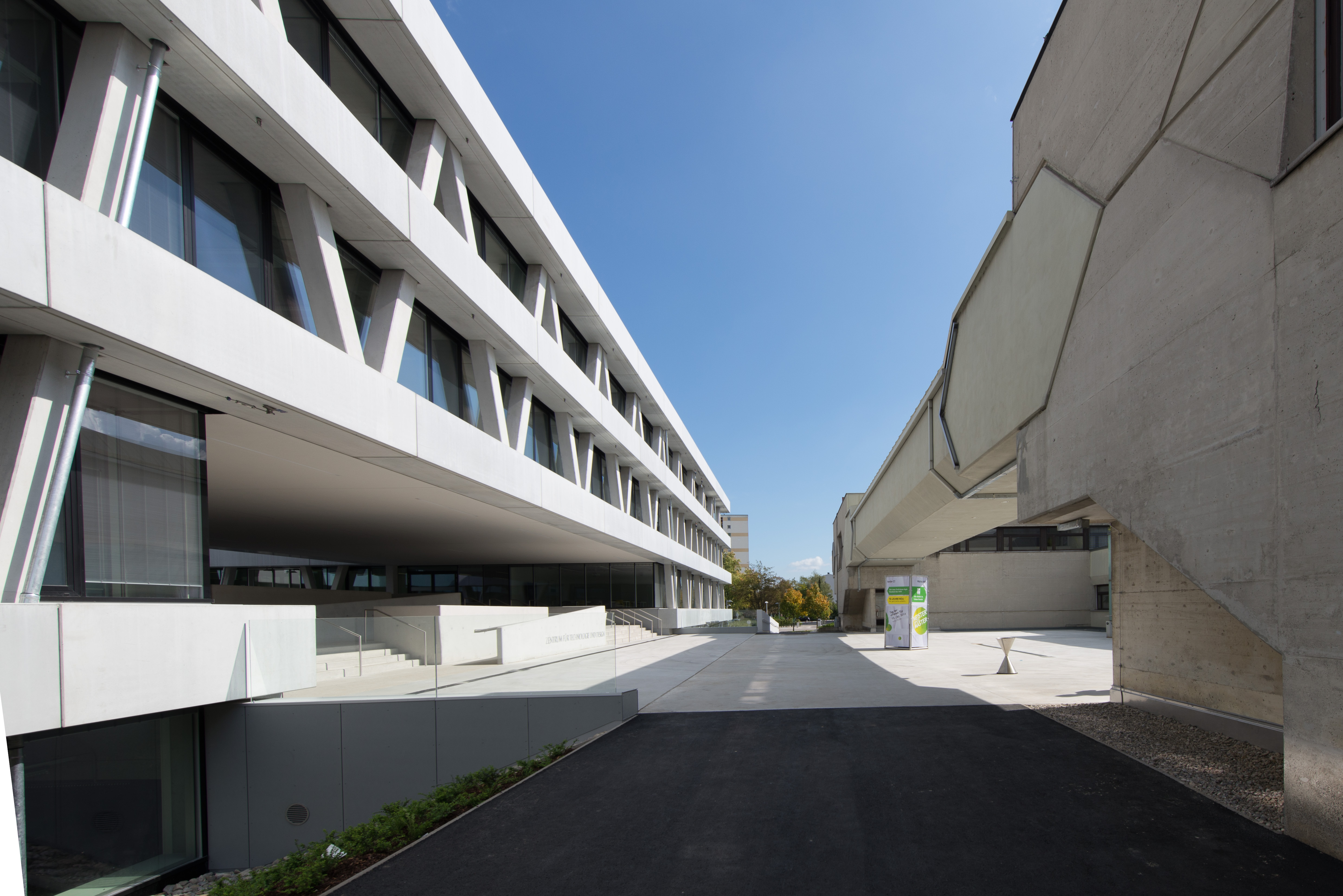 WIFI The making of this work was supported by Wikimedia Austria. For other files made with the support of Wikimedia Austria, please see the category Supported by Wikimedia Österreich.